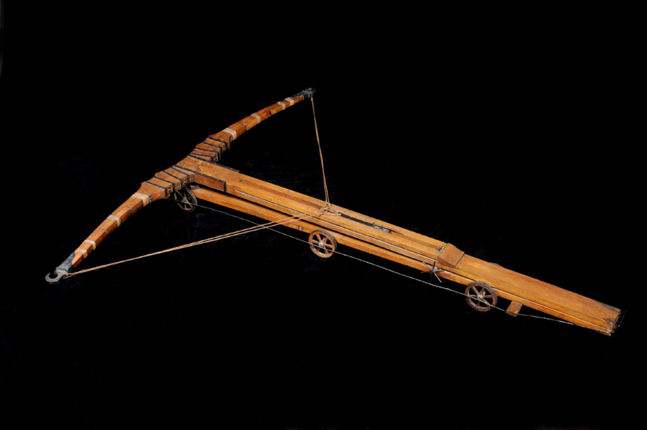 Il modello rappresenta una balestra gigante: le braccia, per un'apertura totale di 24 metri, sono realizzate in struttura lamellare. Sei ruote ne assicurano il movimento Funzione Questa balestra, nelle intenzioni di Leonardo, doveva servire a scagliare grandi dardi creando panico e spavento fra i nemici. Modalità d'uso Per aumentare flessibilità e potenza, il gigantesco arco, doveva essere realizzato a sezioni lamellari; la corda di tiro poteva essere arretrata con un sistema meccanico e veniva fatta successivamente scattare per percussioni o mediante leva.